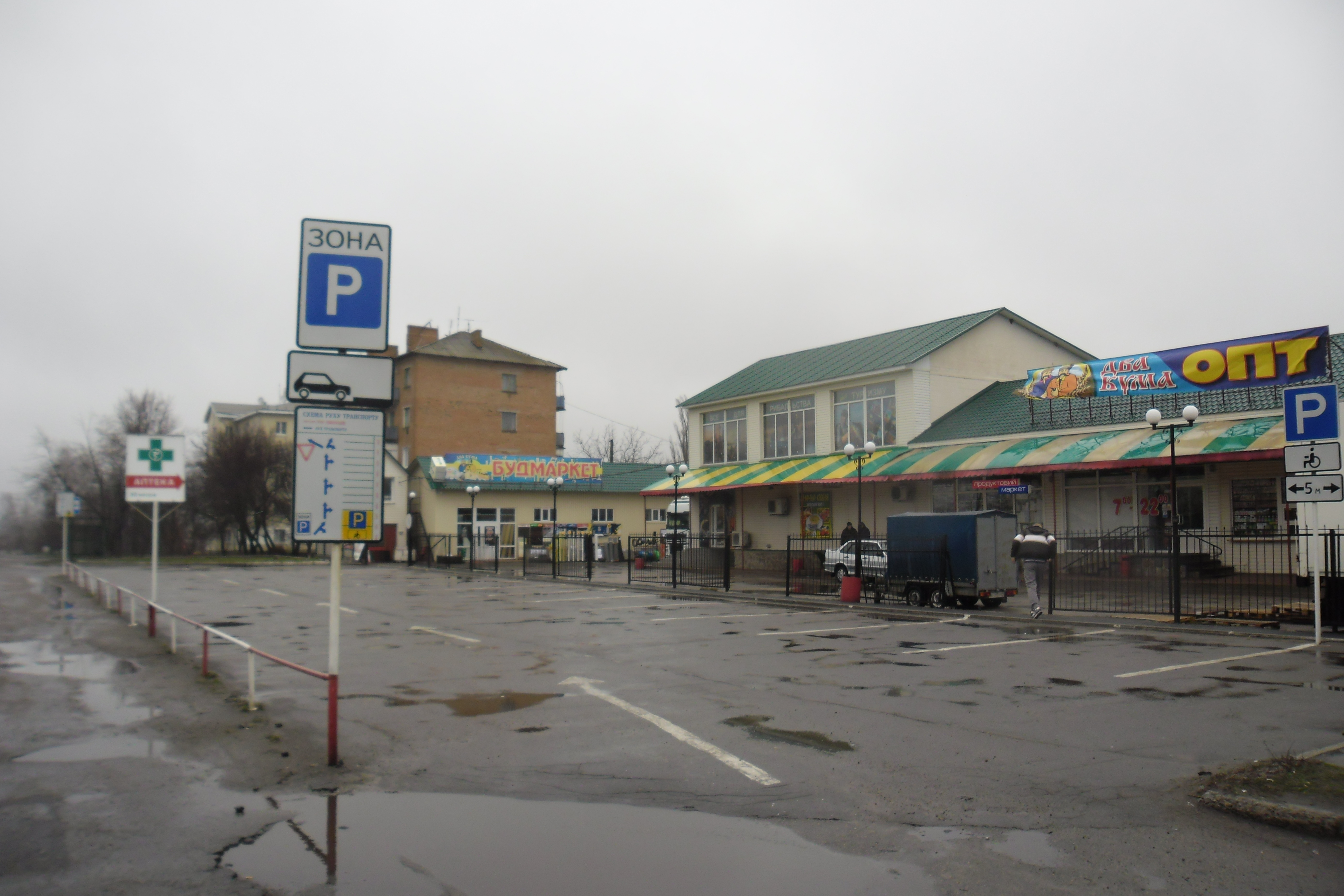 Фото